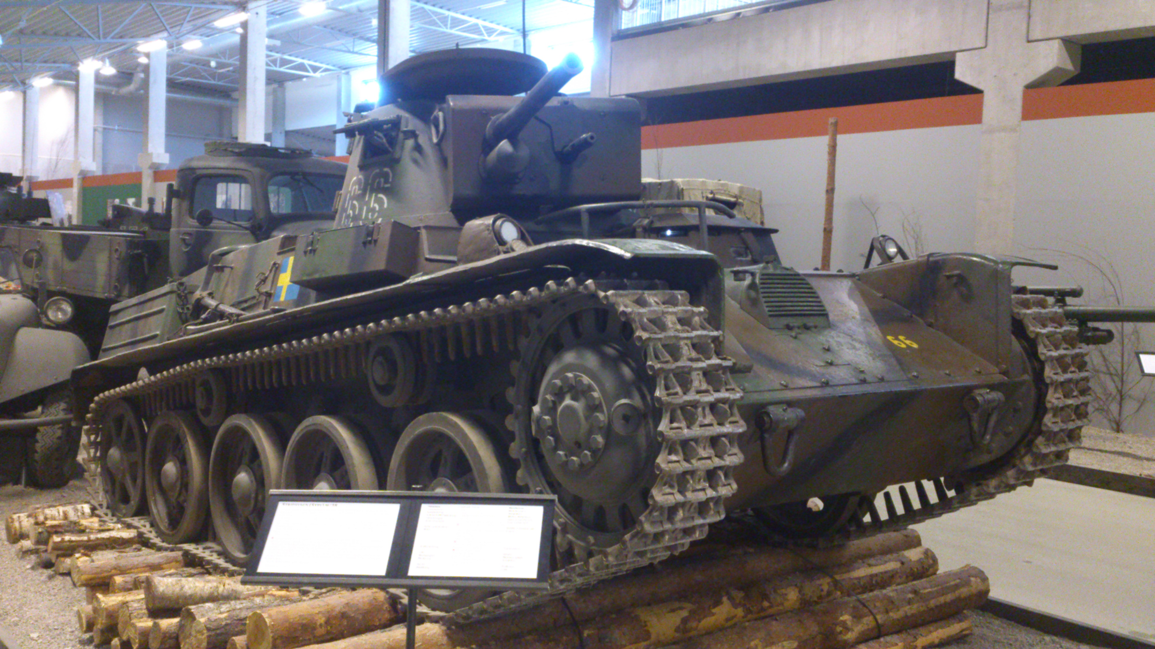 Stridsvagn M 38 på Försvarsfordonsmuseet Arsenalen i Strängnäs